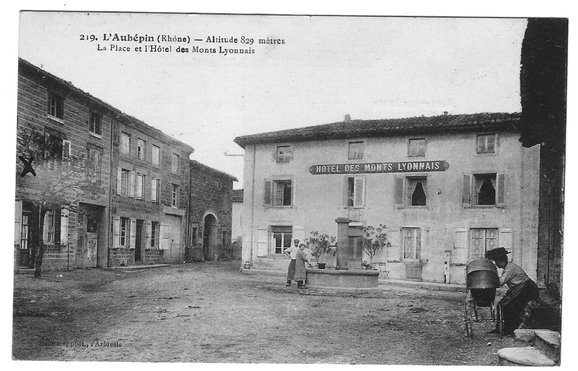 L' Aubépin (Rhône) - Altitude 829 mètres - La Place et l' Hôtel des Monts du Lyonnais (aujourd 'hui commune de Larajasse)